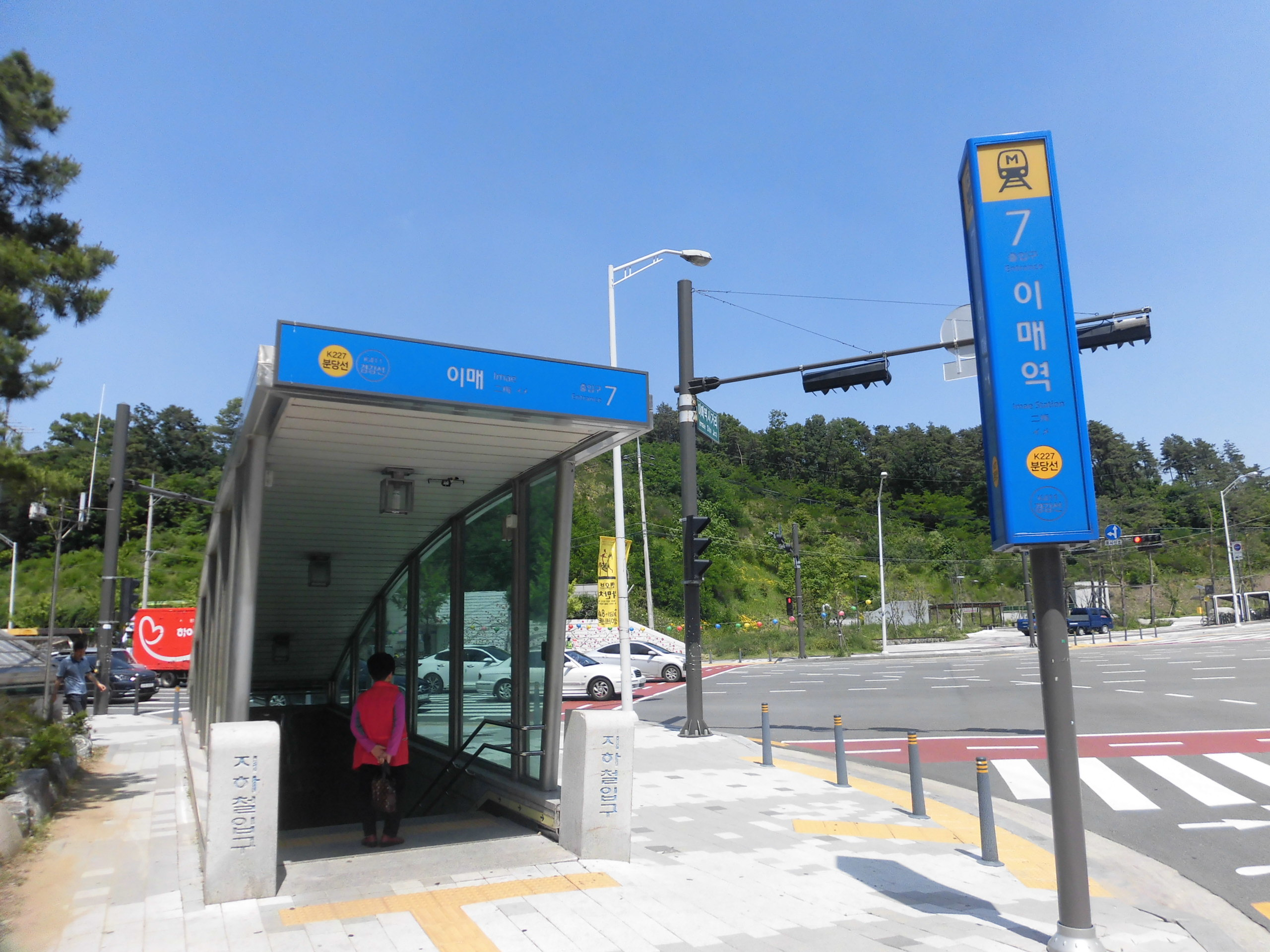 분당선 이매역 7번출구